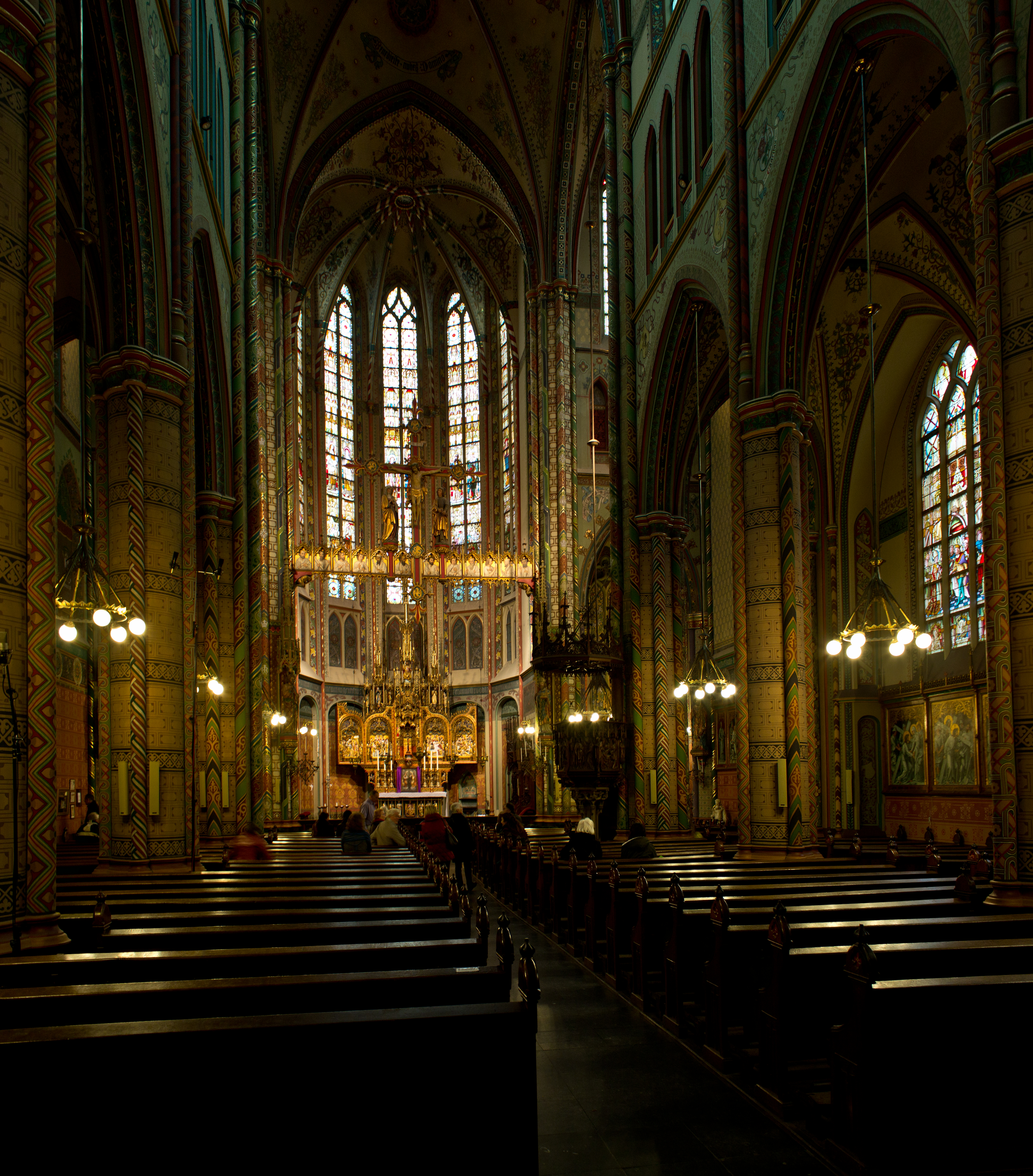 Utrecht, Sint-Willibrordkerk